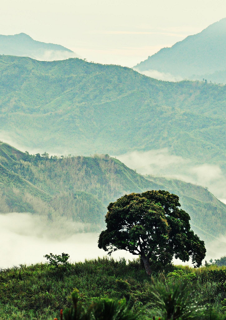 Tanay, Rizal, Philippines